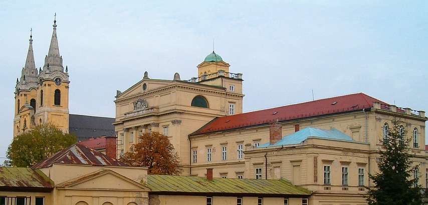 Zirc1